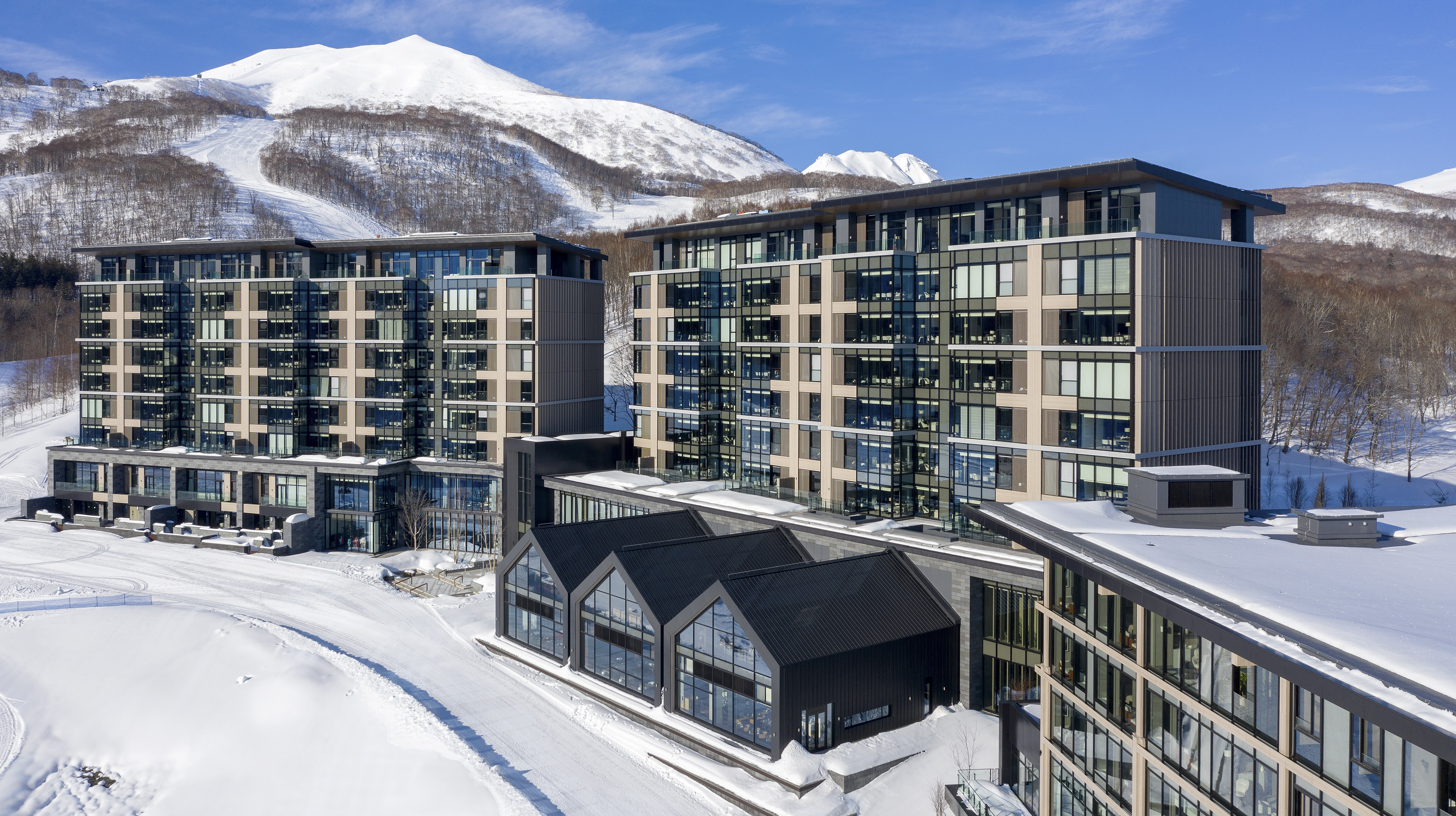 ホテル外観イメージ